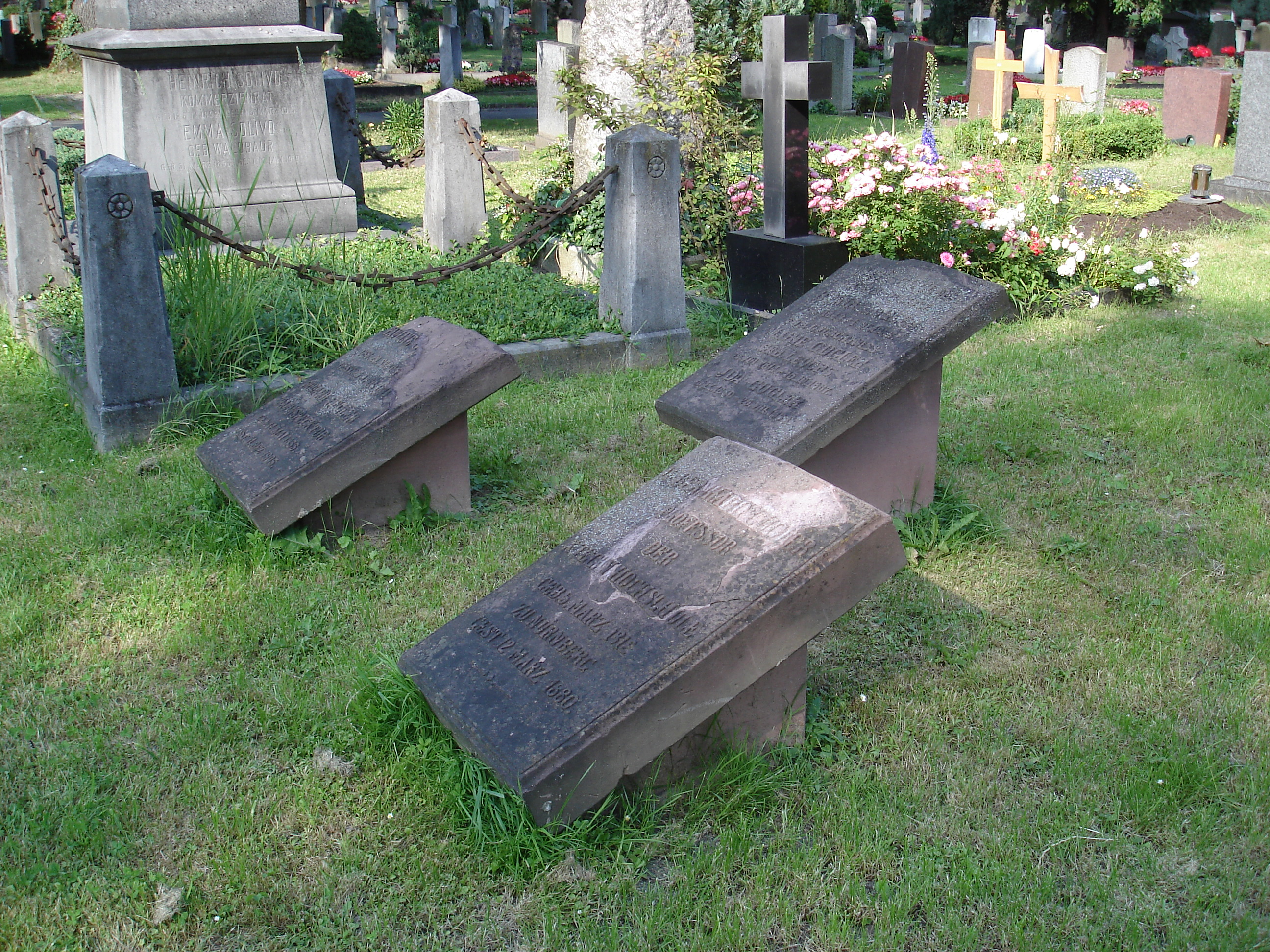 Grab der Familie Gugler in Stuttgart